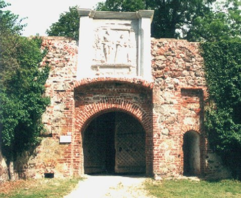 Festung Spantekow: Torhaus, mit Relief of Ulrich und Anna v. Schwerin / Gate with Relief of Ulrich and Anna v. Schwerin